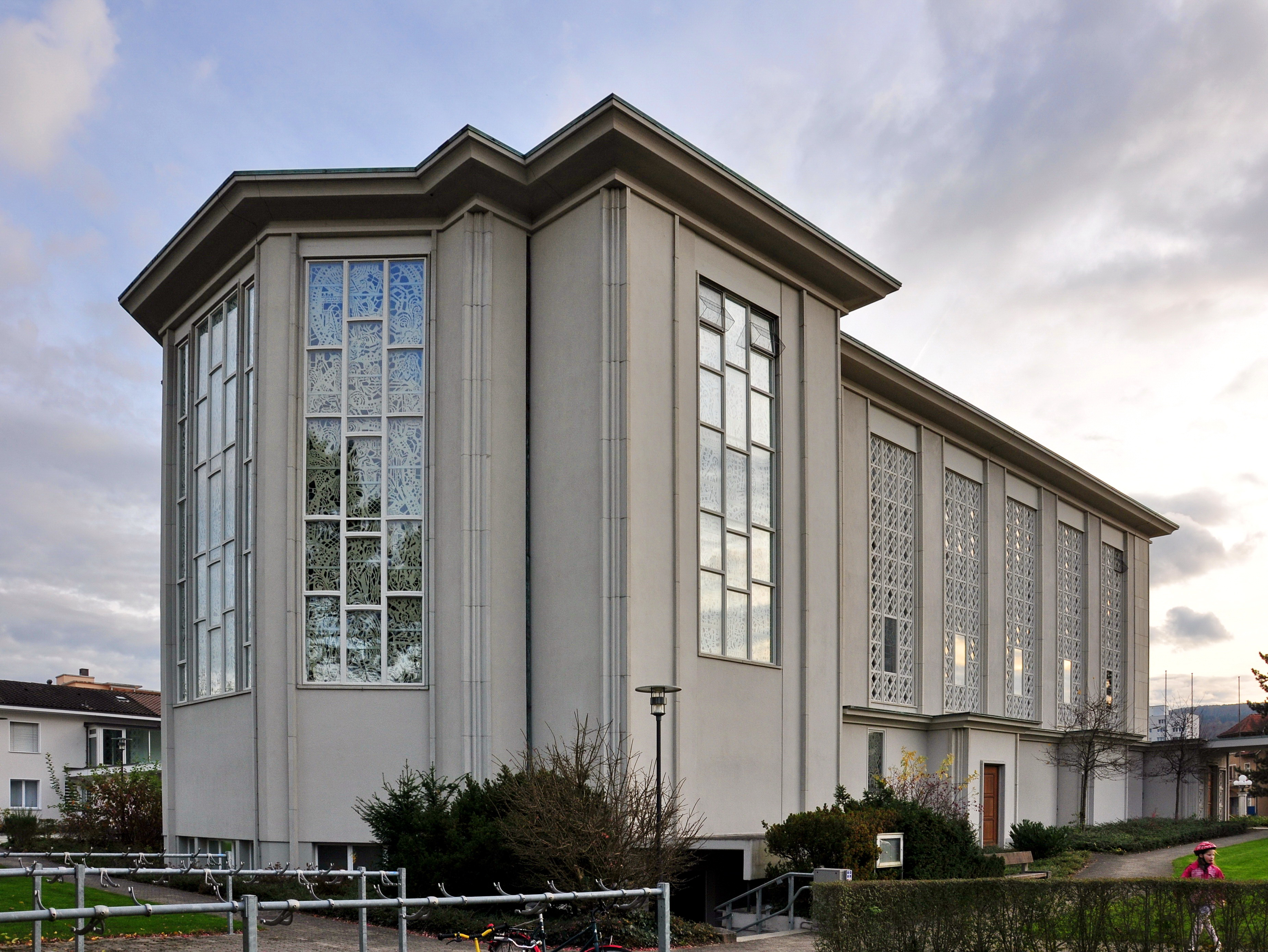 Römisch-katholische Kirche in Dübendorf (Switzerland)